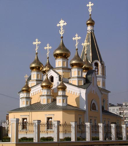 Спасо-Преображенский градоякутский кафедральный собор